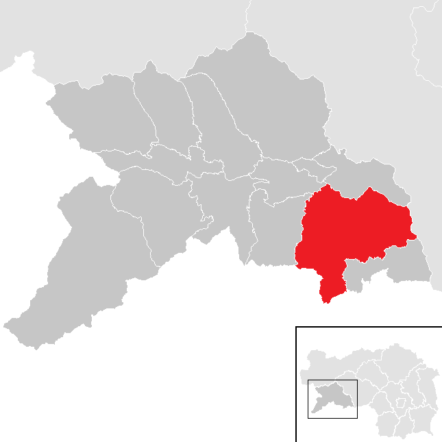 Lage von Neumarkt in der Steiermark im Bezirk Murau